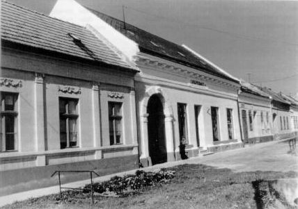 Levél, Fő u. 2. régen